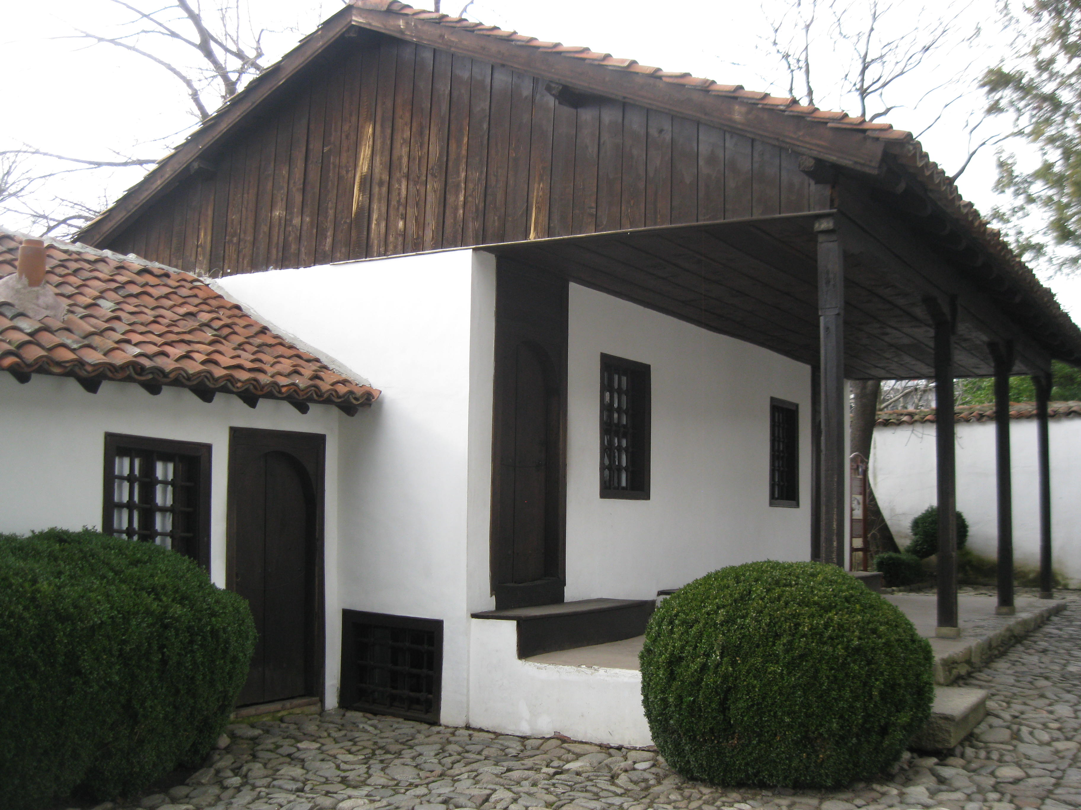 Национален музей „Васил Левски”, Карлово